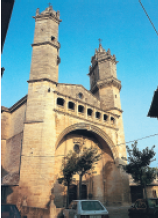 Andres Santuaren aurrealdea, Eltziegon